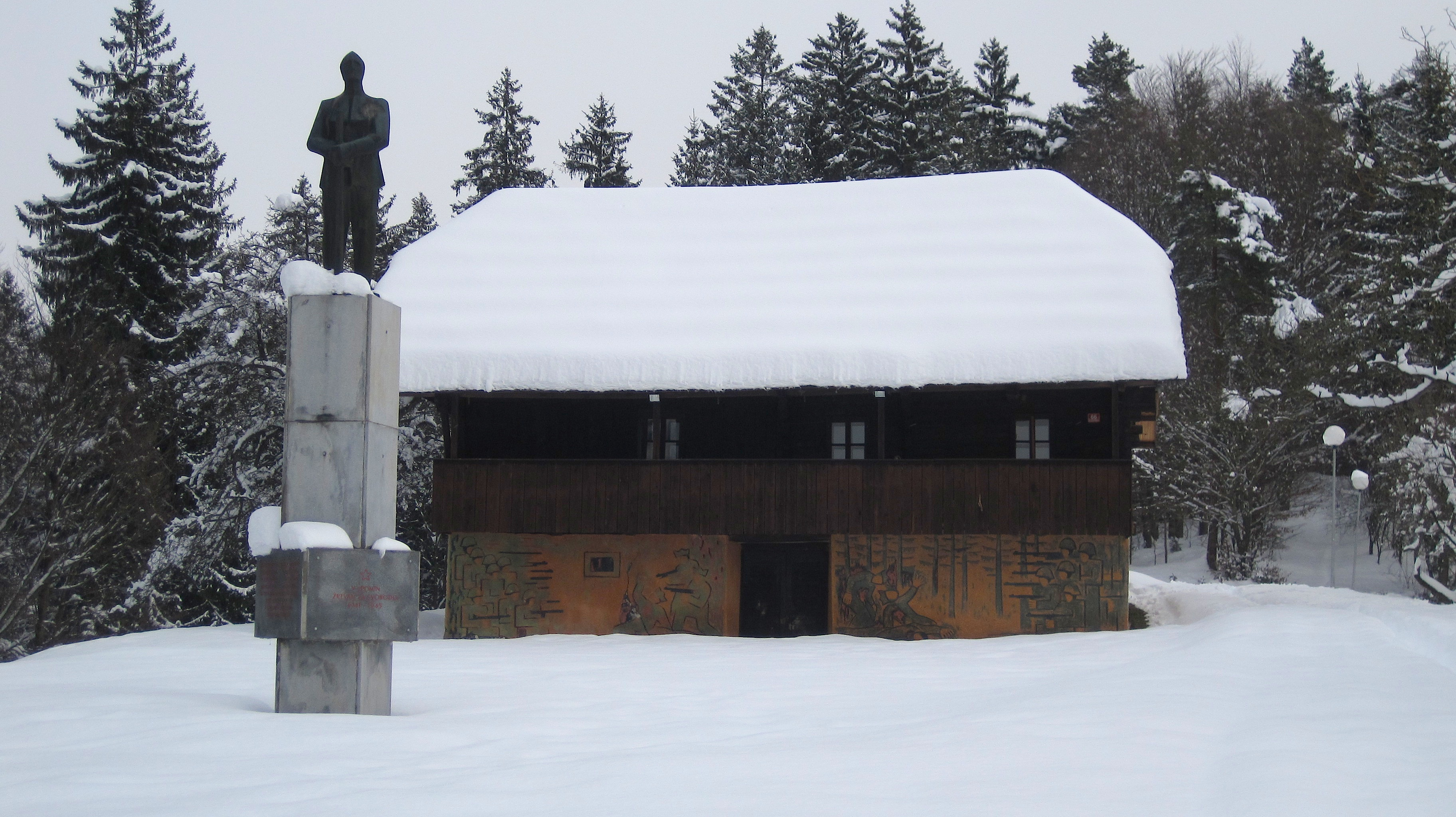 Župank pozimi